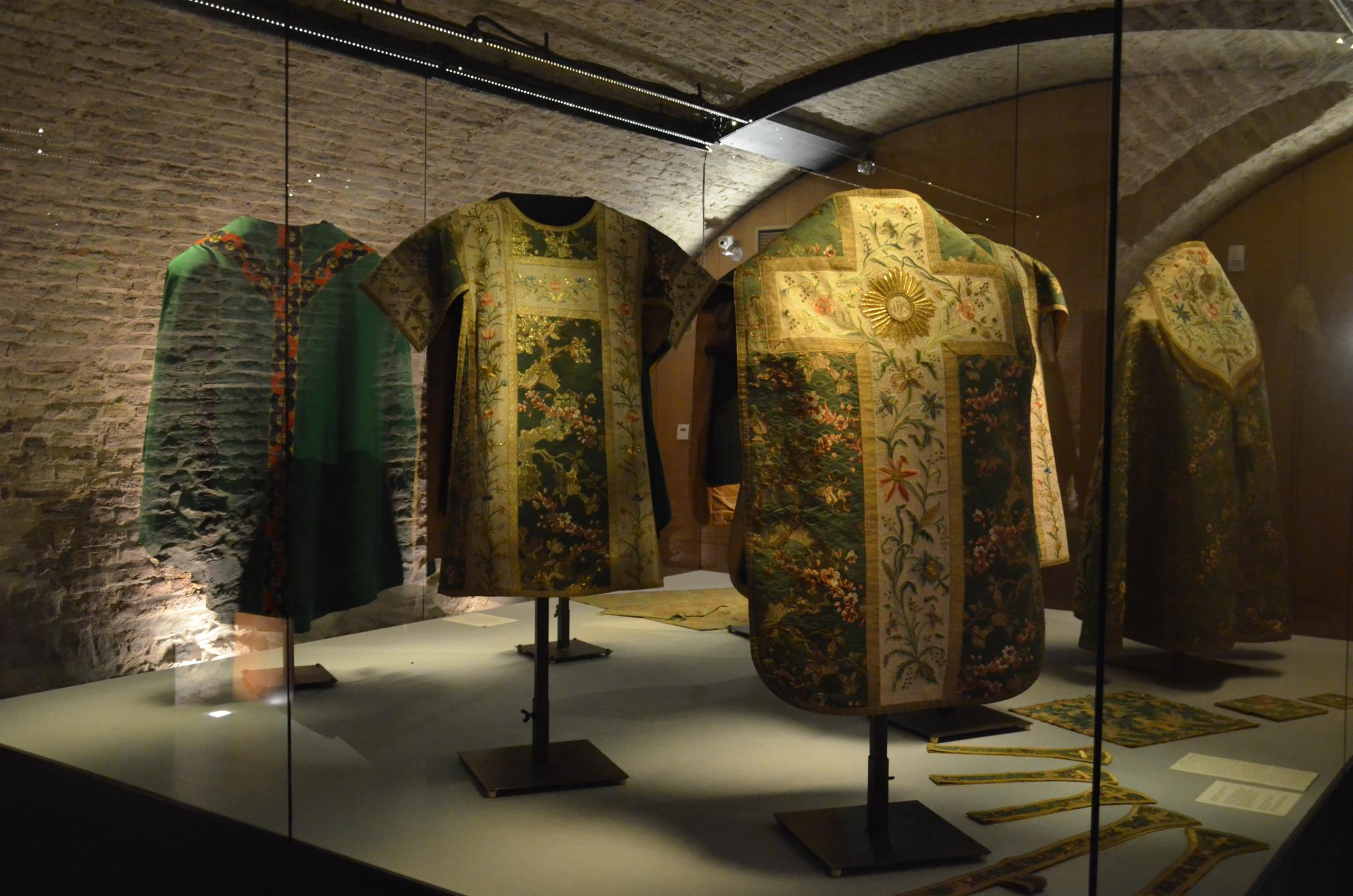 Domschatzkammer Aachen